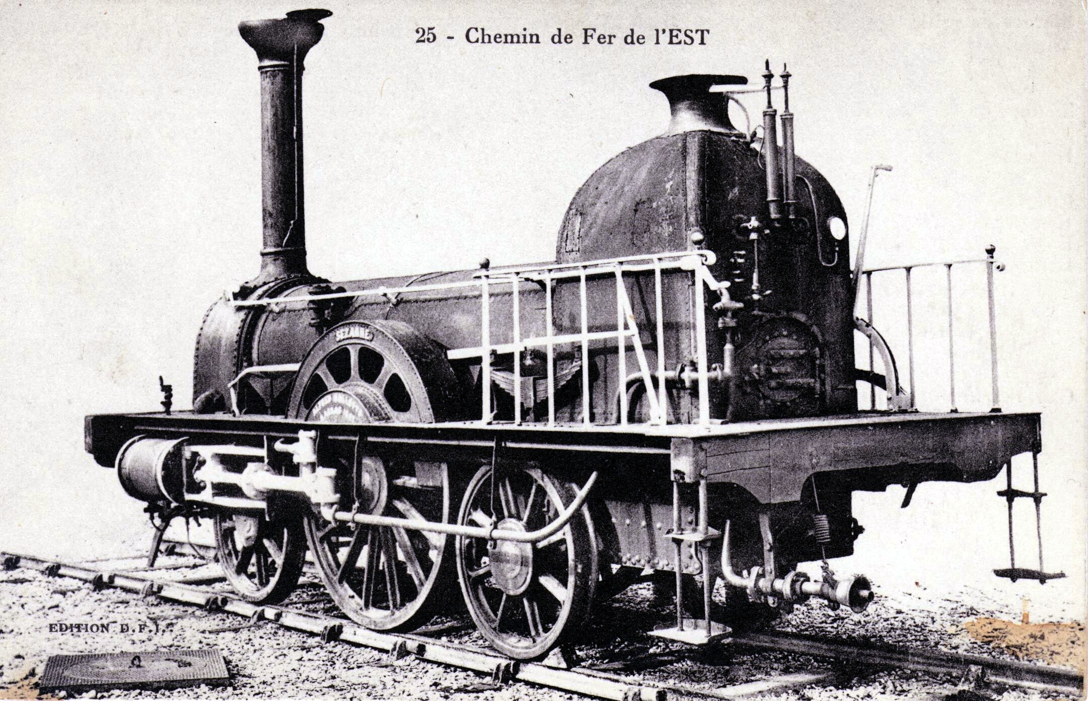 CPA : Edition D.F.I. Légende au recto : 25 - Chemin de fer de l'Est. Légende au verso : Machine n° 291 (ex n° 5 de la Cie de Montereau à Troyes) construite en 1847, par A. Hallette, à Arras. Série 288 à 299. Cette machine, actuellement conservée aux ateliers d’Épernay, est la plus ancienne existant en France Surface de grille : 0 m2 95 surface de chauffe foyer : 5 m2 05 surface de chauffe tubes : 57 m2 85 surface de chauffe totale : 62 m2 90 timbre de la chaudière 6 k. Diamètre des roues motrices : 1 m 690 Diamètre des roues porteuses : 1 m 200 Diamètre des cylindres : 0 m 340 Course des pistons : 0 m 550 Empattement rigide Ecartement extrême : 3 m 010 Longueur totale : 7 m 115 Poids adhérent vide : 8.370 k. Poids total service : 20.100 k. Charge par essieu 1 : 6.190 k. Charge par essieu 2 : 8.370 k. Charge par essieu 3 : 5.540 k.